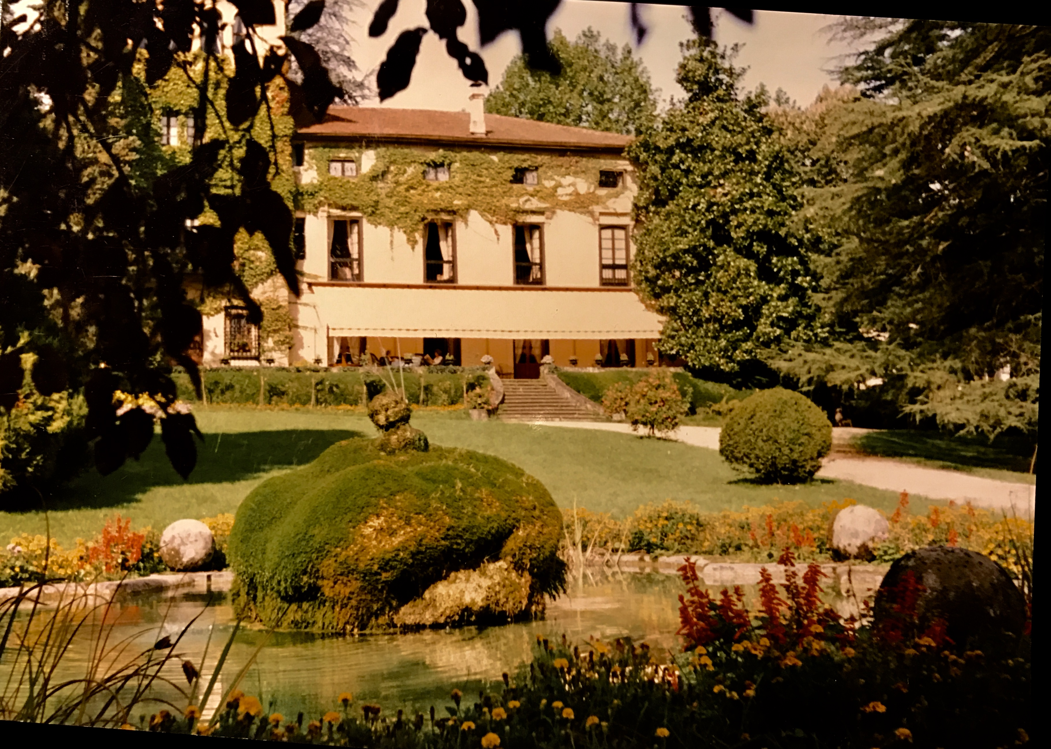 Torre de Berriz; Casa Palacio que perteneció a los marqueses de Berriz